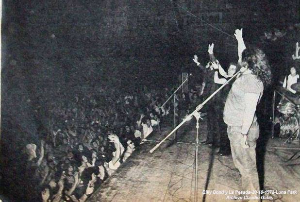 20-10-72 Billy Bond y el resto de los miembros de La Pesada, Claudio Gabis entre ellos, tratando de apaciguar al público. Instantes más tarde se produciría la debacle y la quasi destrucción del patio de butacas del estadio, con el famoso "Rompan Todo!!!" dicho por Billy.